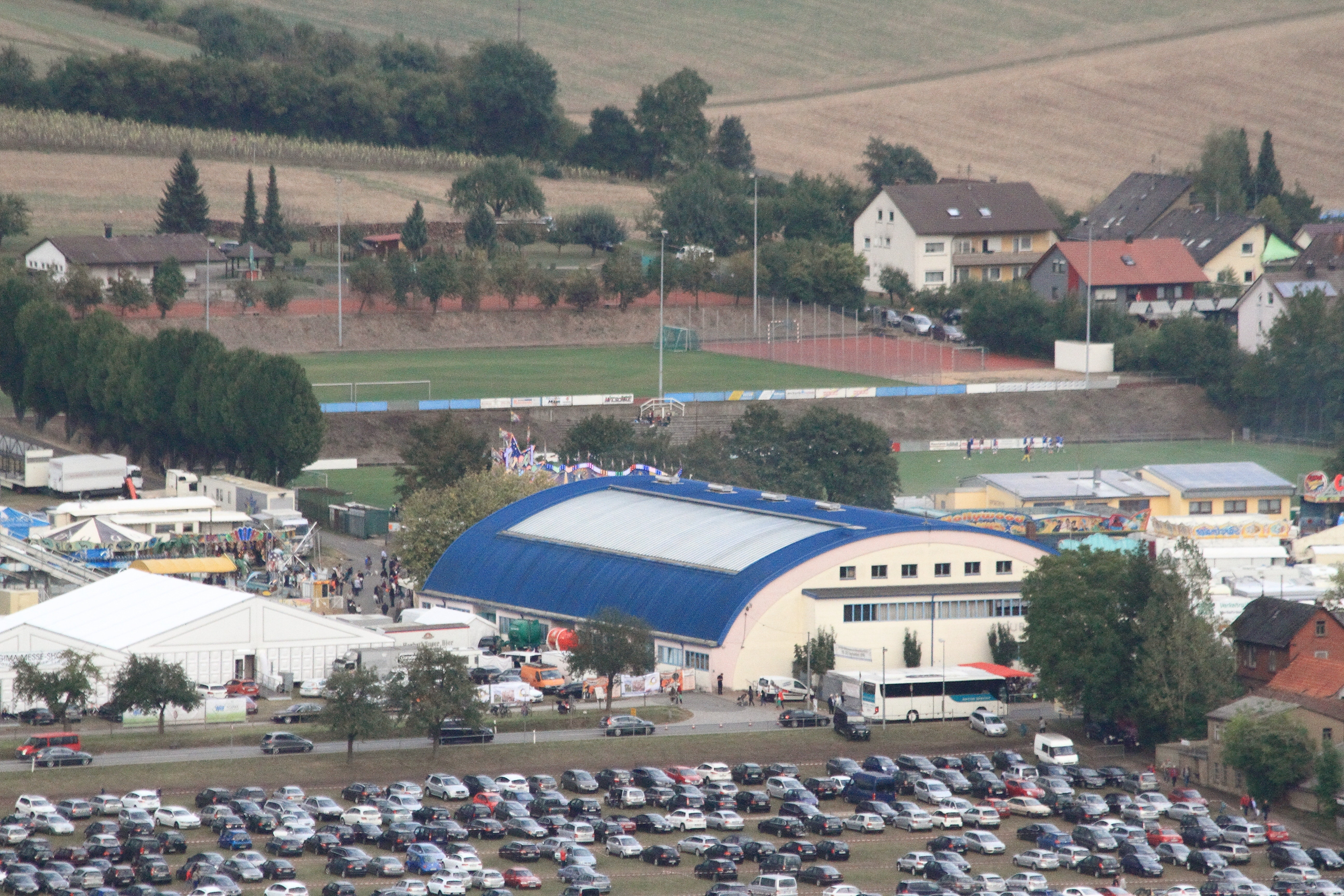 Die Tauber-Franken-Halle zur Zeit der Königshöfer Messe 2016.